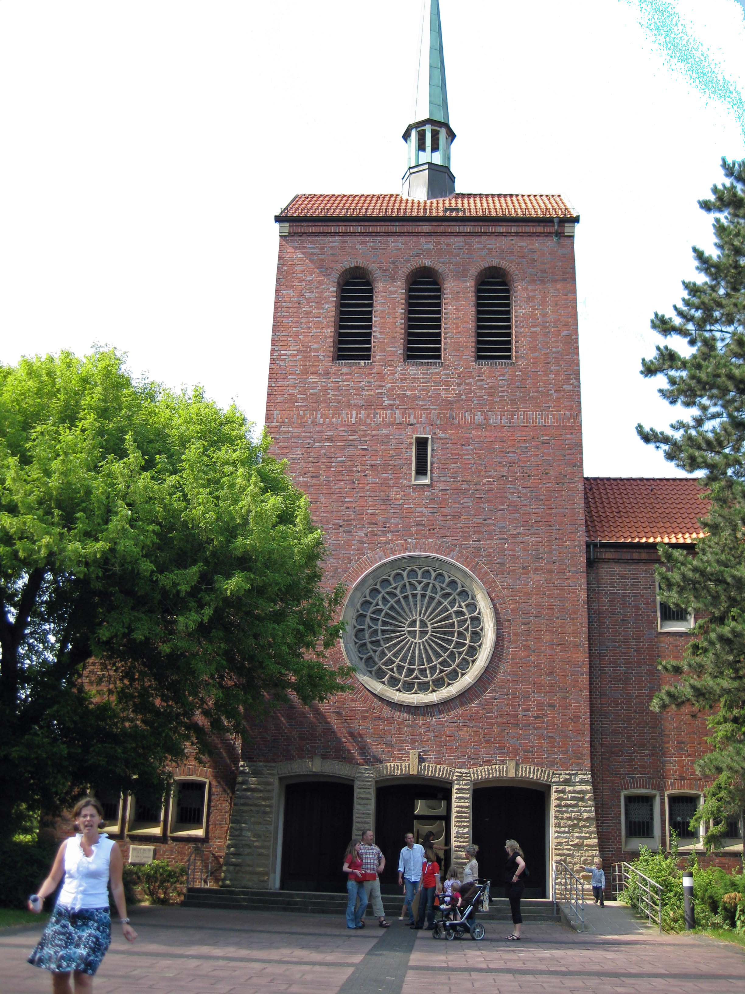 Front der St.Konrad Kirche in Herne Constantin